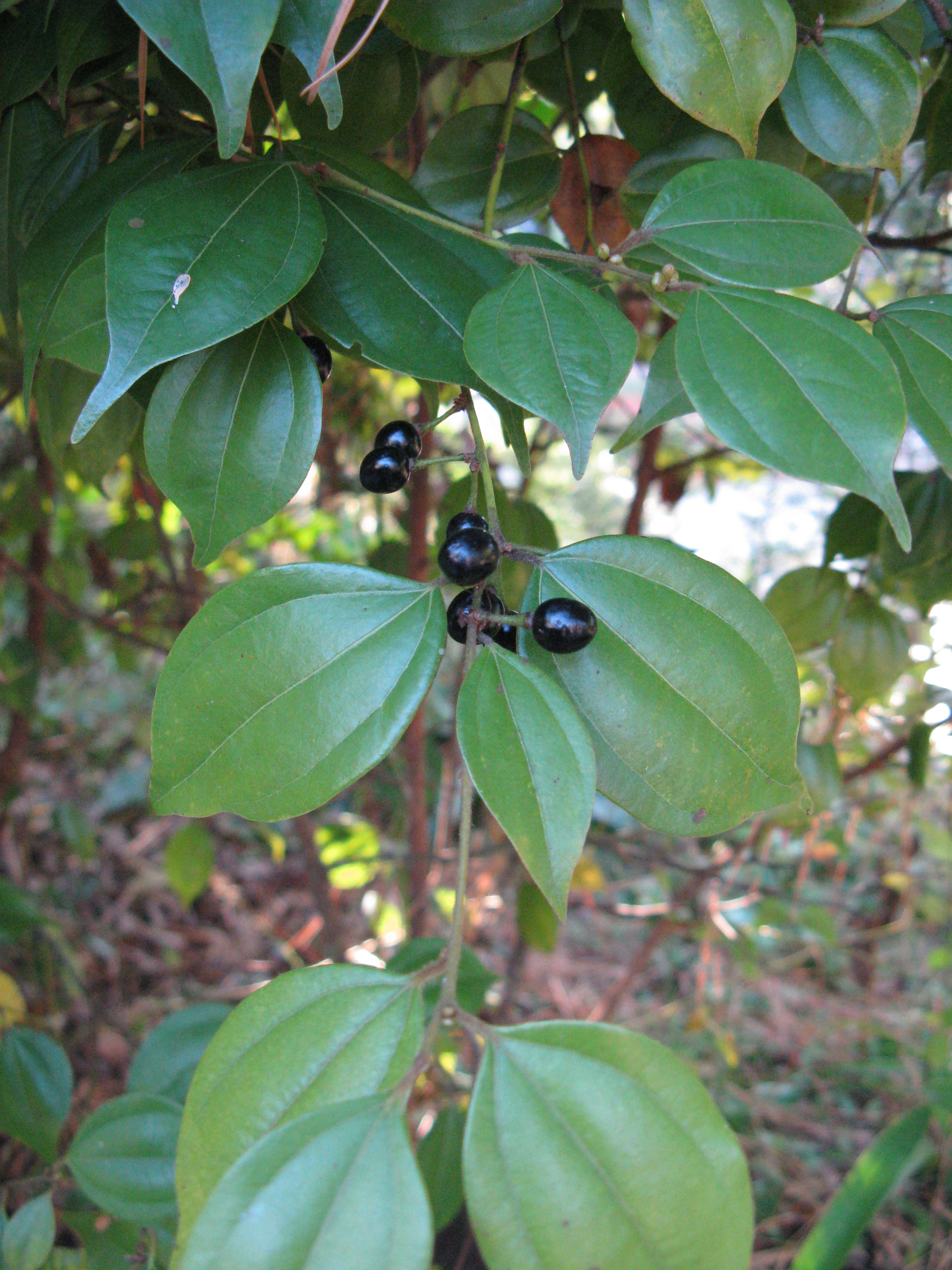 Scientific name Lindera aggregata